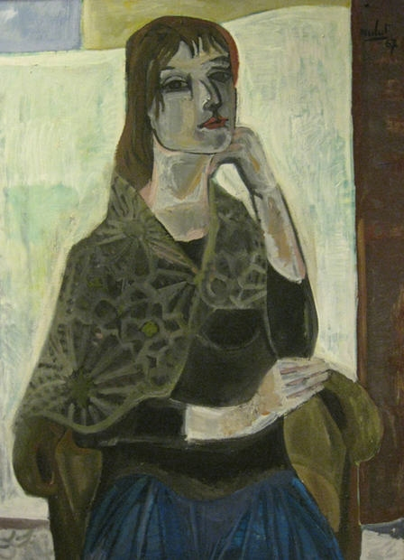 „Barbara“, Bildnis der Frau von Hans Neubert (1967, Öl auf Leinwand, 110 x 80 cm)